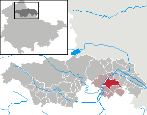 Heldrungen in Thuringia - Kyffhäuserkreis